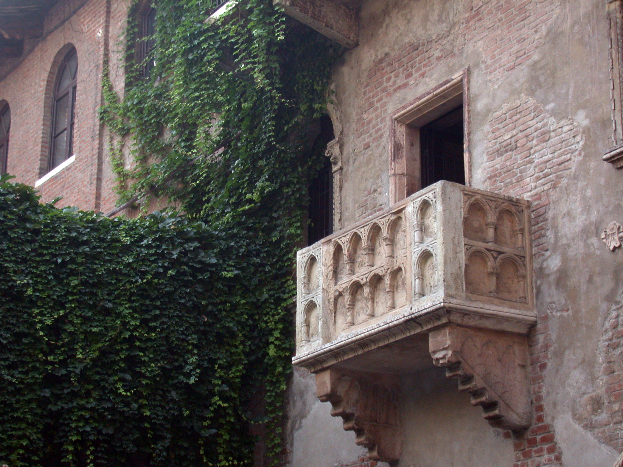 Verona, so called Giulietta's "balcony"